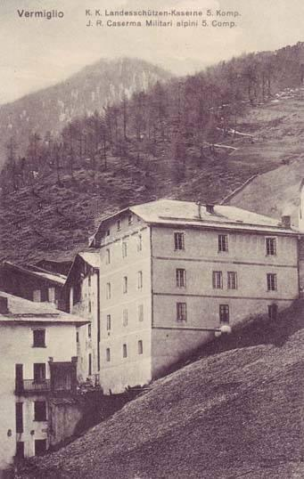 Sommerkaserne der k.k. Landesschützen in Vermiglio (Val di Sole/Trentino)